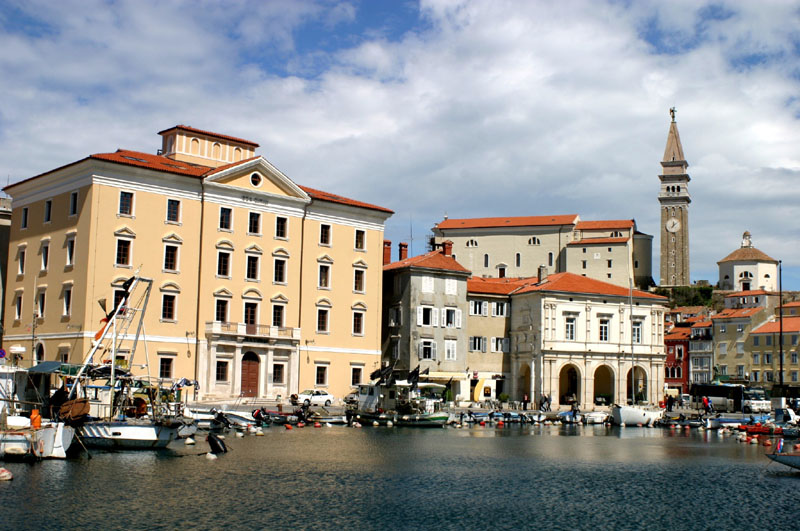 Piran (pogled z morja)